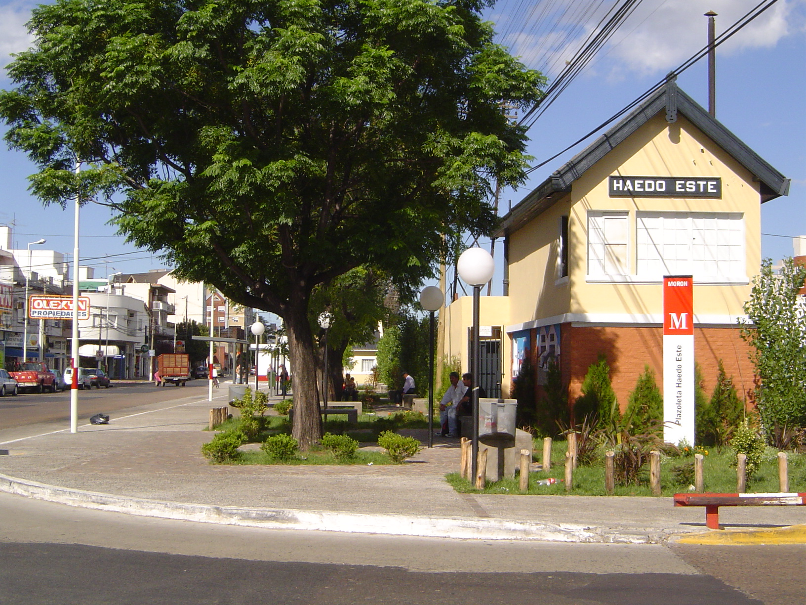 La foto la tomé yo el 26 de febrero de 2006. Plazoleta "Haedo Este", Haedo, Partido de Morón, Provincia de Buenos Aires, Argentina.